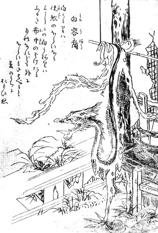 Shiro-uneri (白溶裔) from the Gazu Hyakki Tsurezure Bukuro (百器徒然袋)